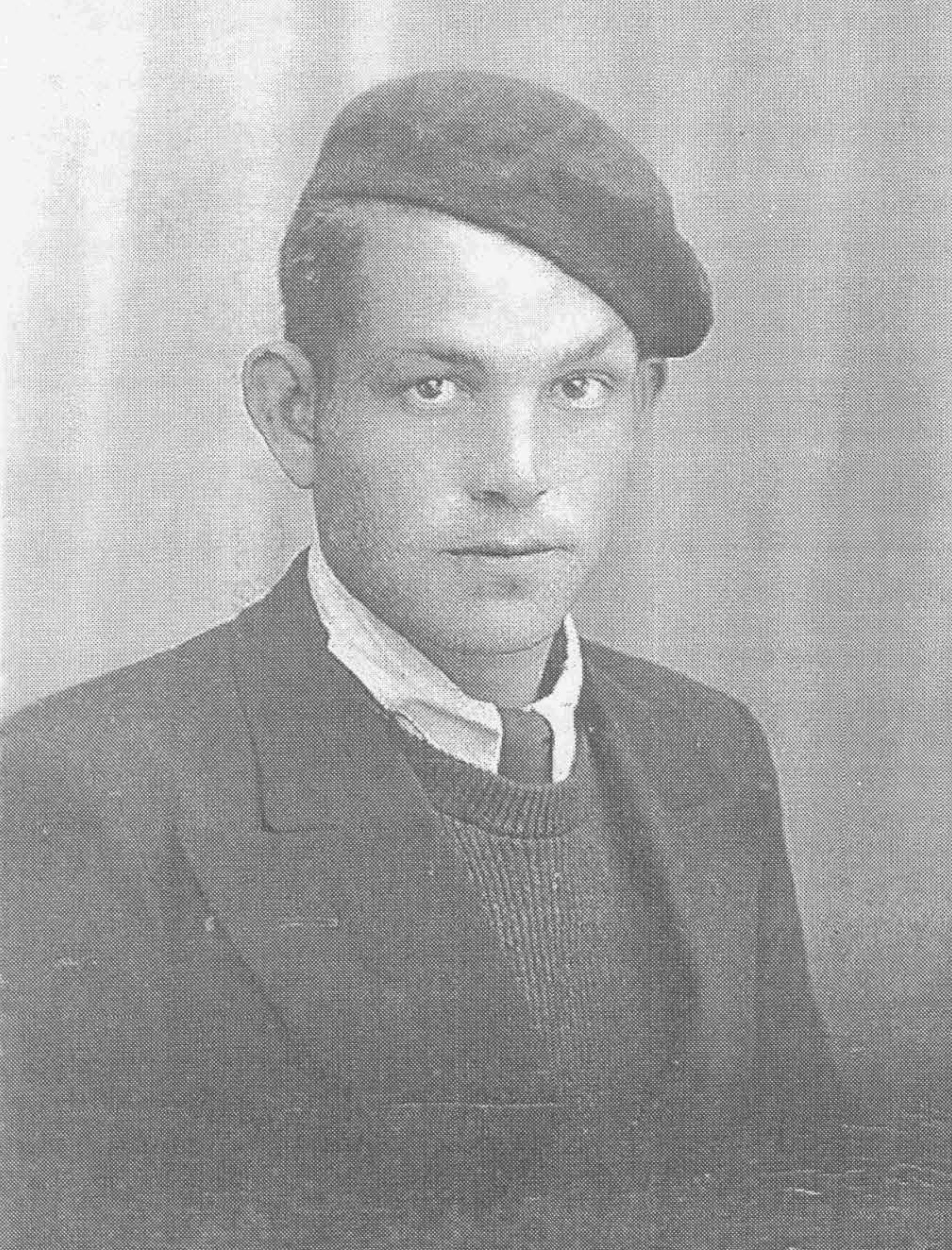 Valentín Juara Bellot (Alcalá de Henares 3/11/1918 - Mauthausen, 10/06/1943) soldado republicano español, fallecido en el campo de concentración de Mauthausen, durante la Segunda Guerra Mndial.